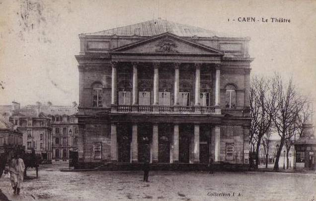 Théâtre de Caen avant sa destruction en 1944